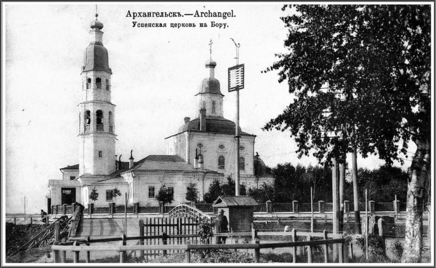 г. Архангельск. Успенско-Боровская церковь и "падающая колокольня"